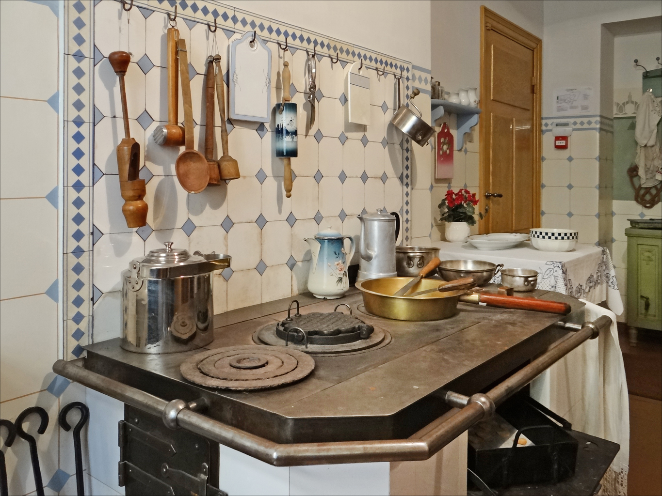 Cuisinière et ustensiles de cuisine de l'appartement Les objets sont fabriqués en Lettonie, sauf la bouilloire qui date de 1892 et a été fabriquée en Russie L'intérieur du musée d'art nouveau de Riga reproduit l'aménagement d'un appartement de Riga en 1903. Site du musée d'art nouveau de Riga